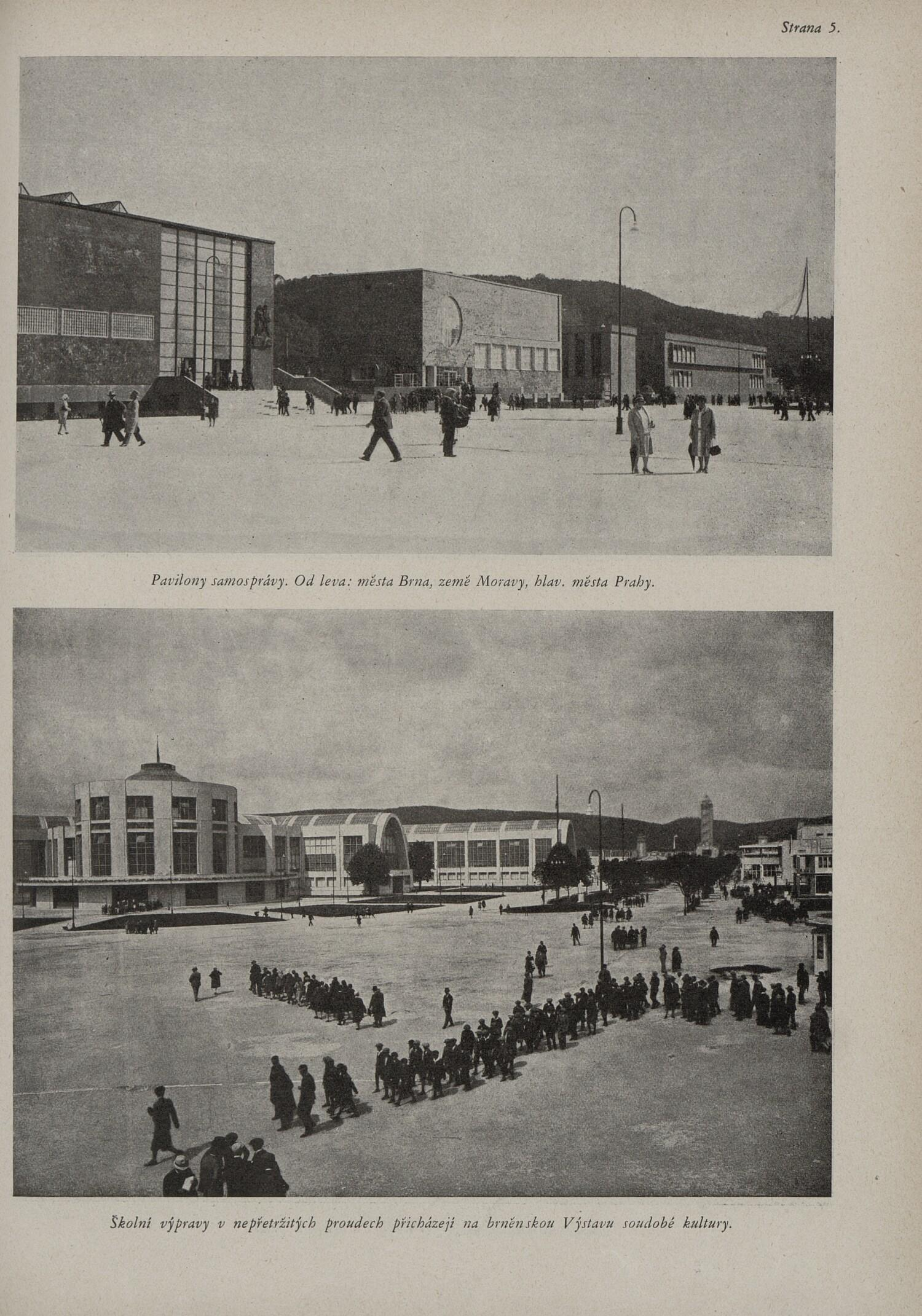 Výstava české kultury (Český svět 26. 7. 1928, s.5